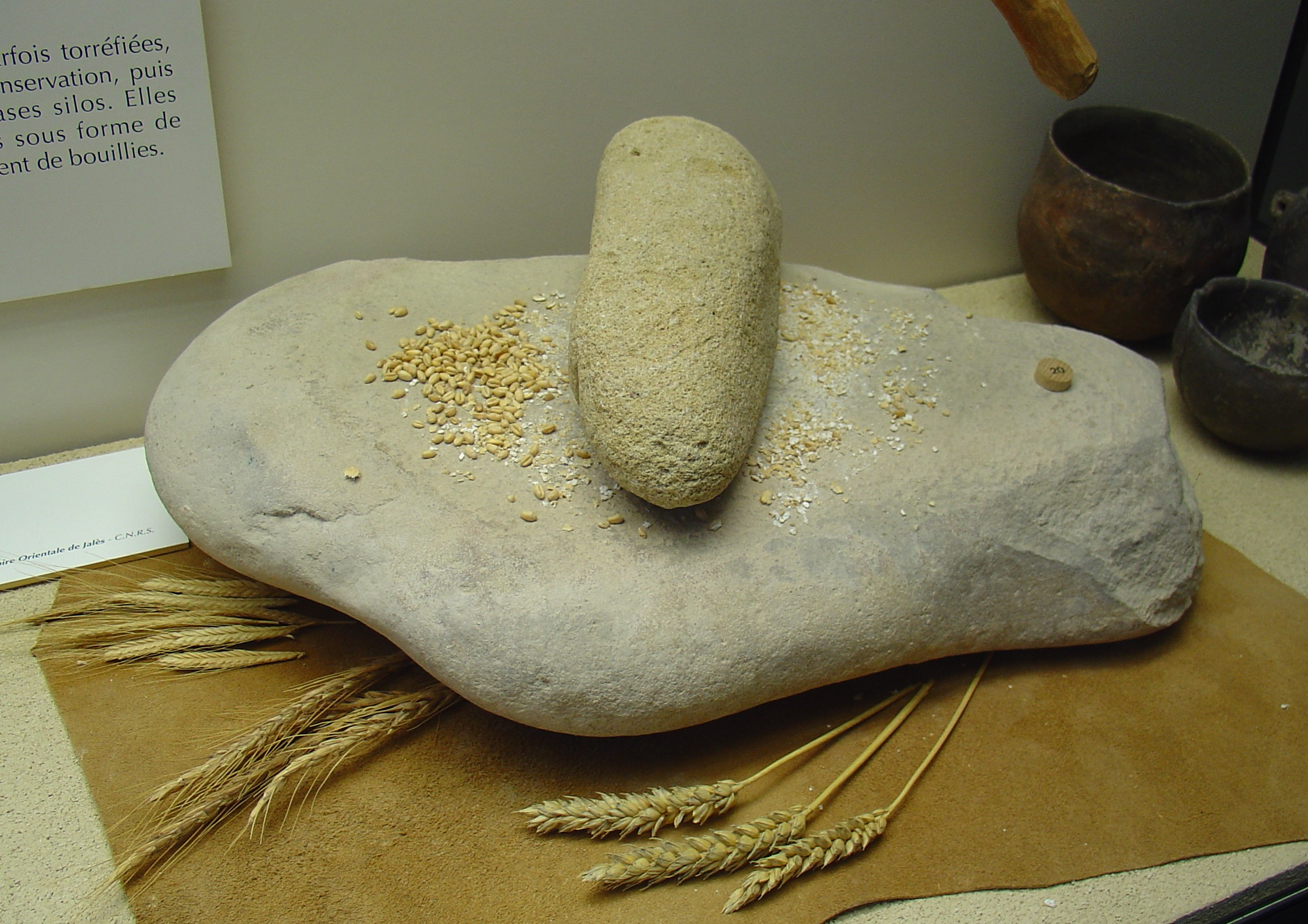 Meule et broyeur du Néolithique. Orgnac, Ardèche (France)